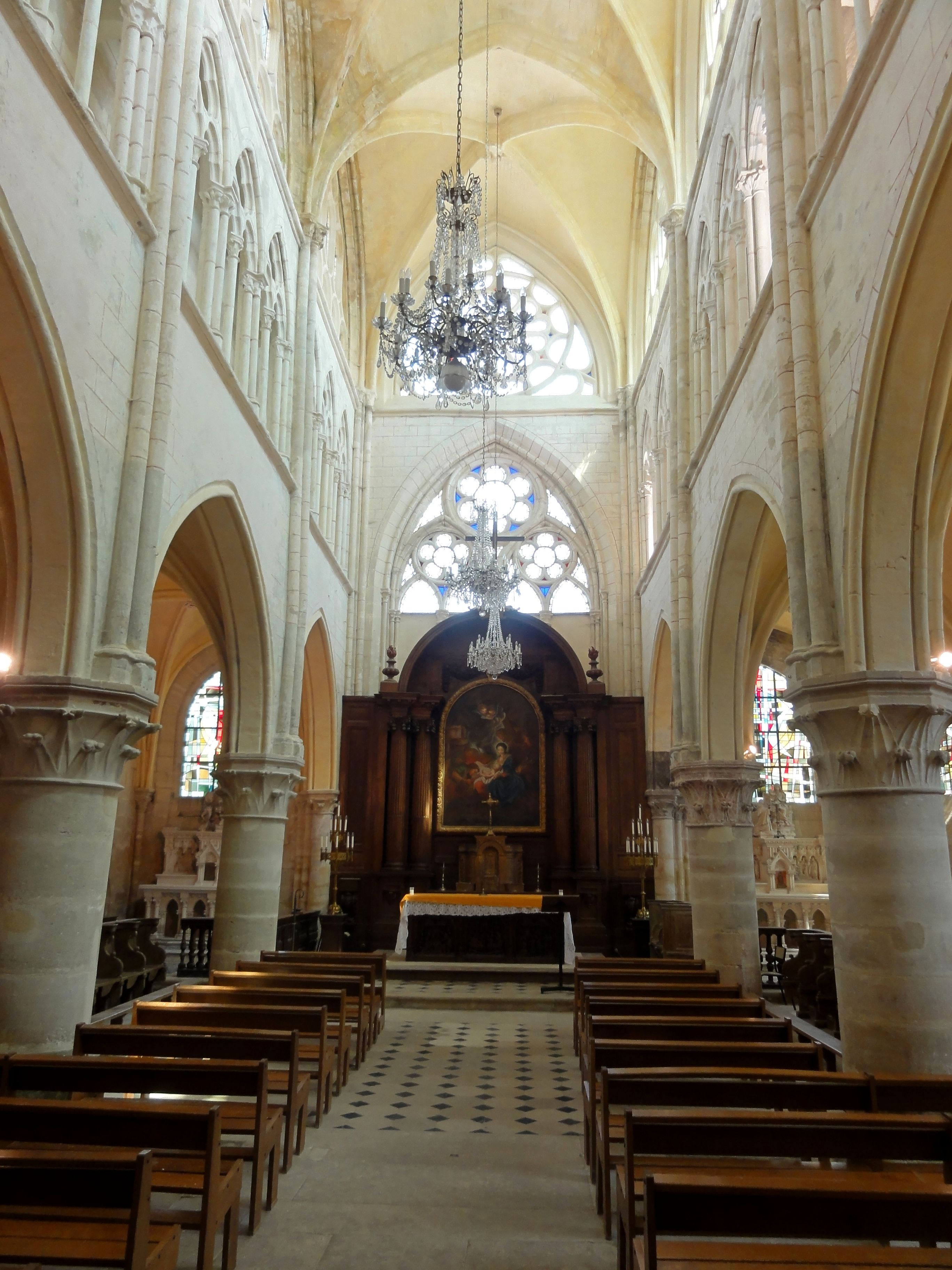 Chœur.